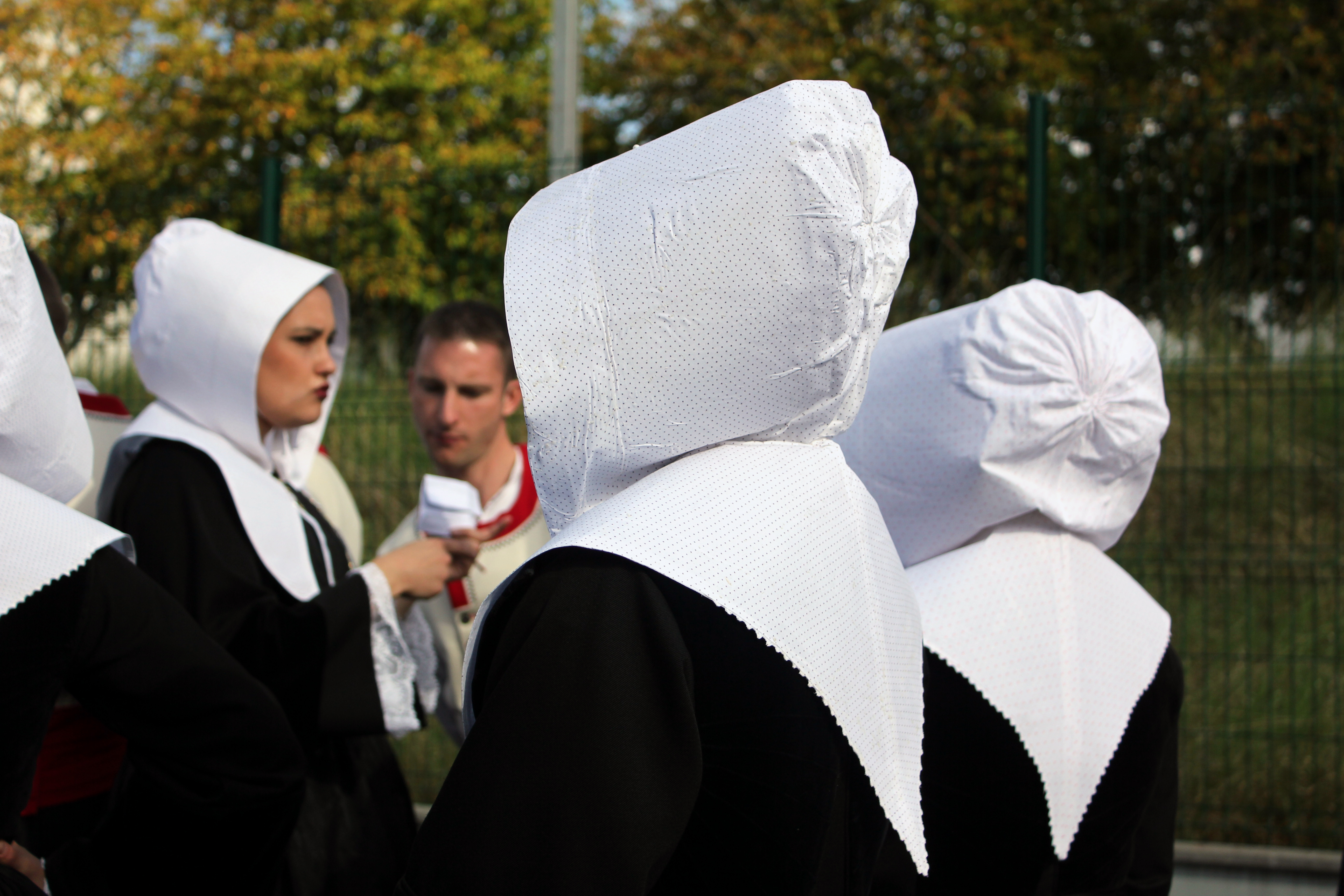 Version du costume féminin du pays de Lorient porté jusque vers 1915. L'élément de la coiffe visible ici est le capot gris , tissu blanc à pois gris, porté l'Eté. Le capot noir, porté l'Hiver est fait de tissu noir.